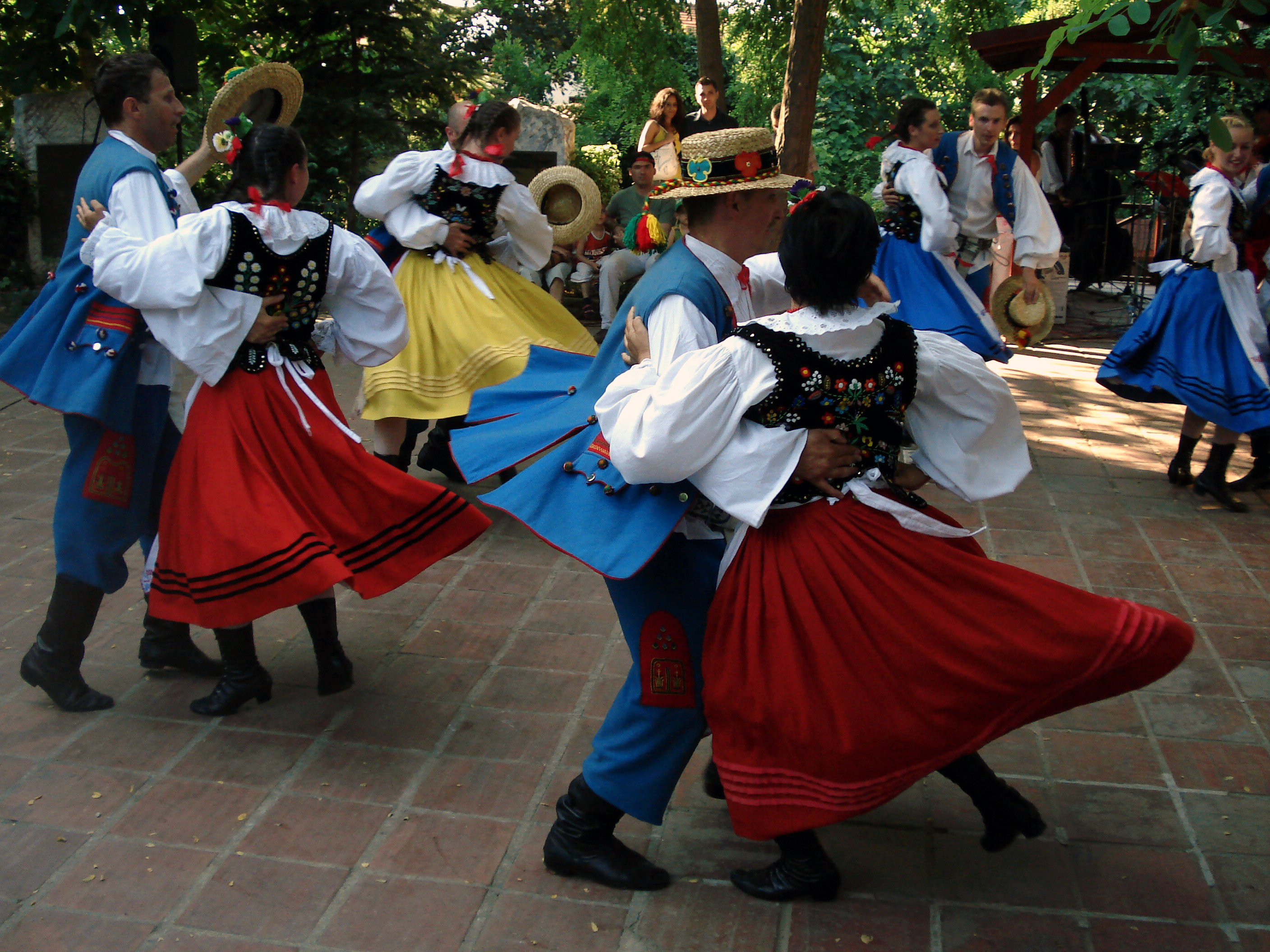 Polonezköy "Kiraz" Festival